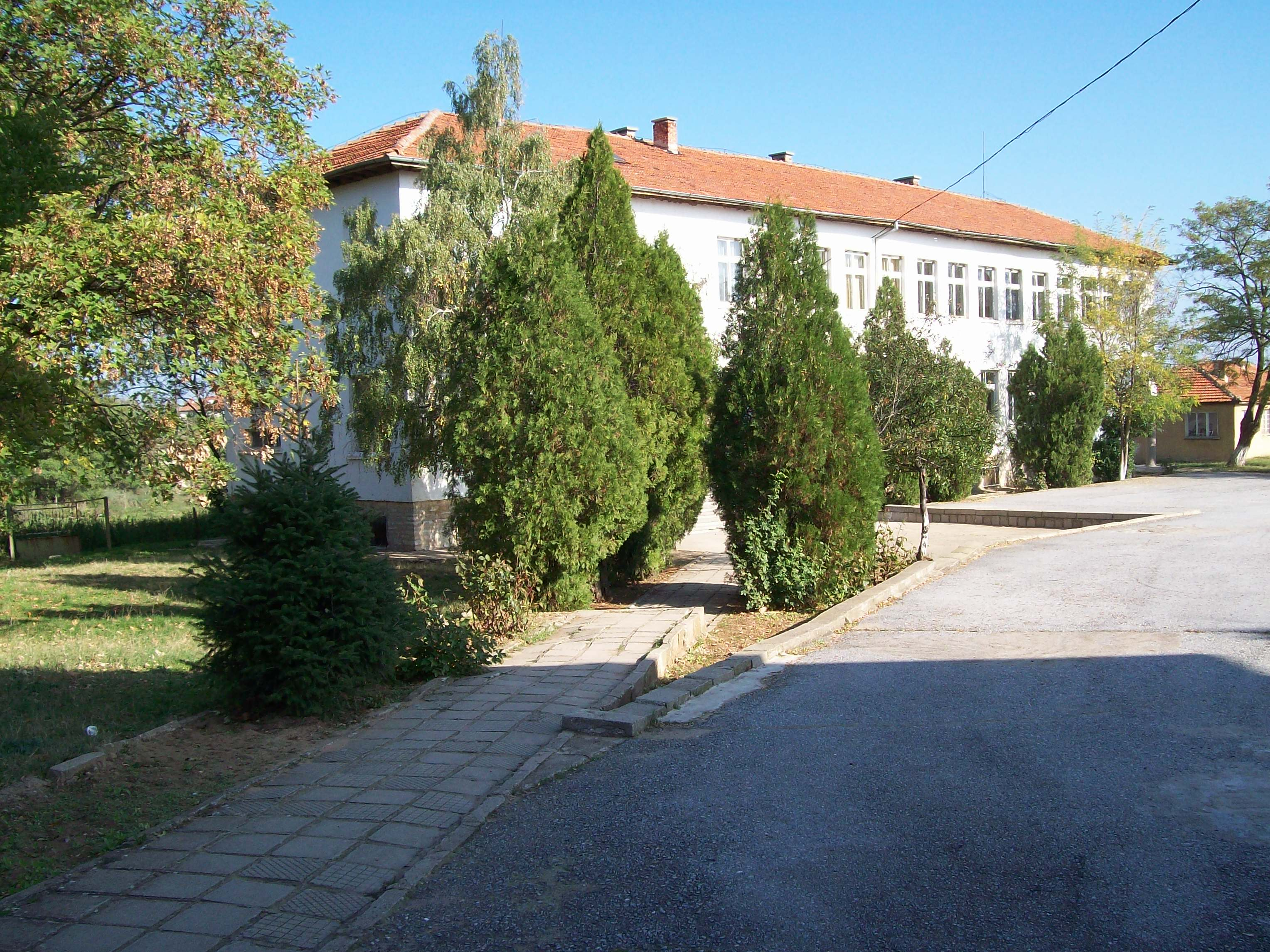 Uchilishte